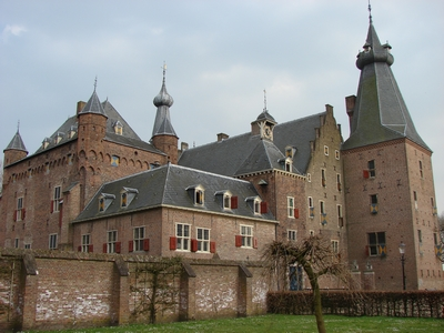 Nedersaksies: Doorwerth_kastele.jpg